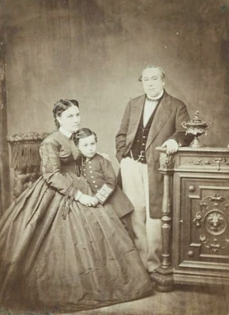 Граф Дмитрий Николаевич Шереметев с женой Александрой Григорьевной (1825—1874) и сыном Александром (1859—1931)